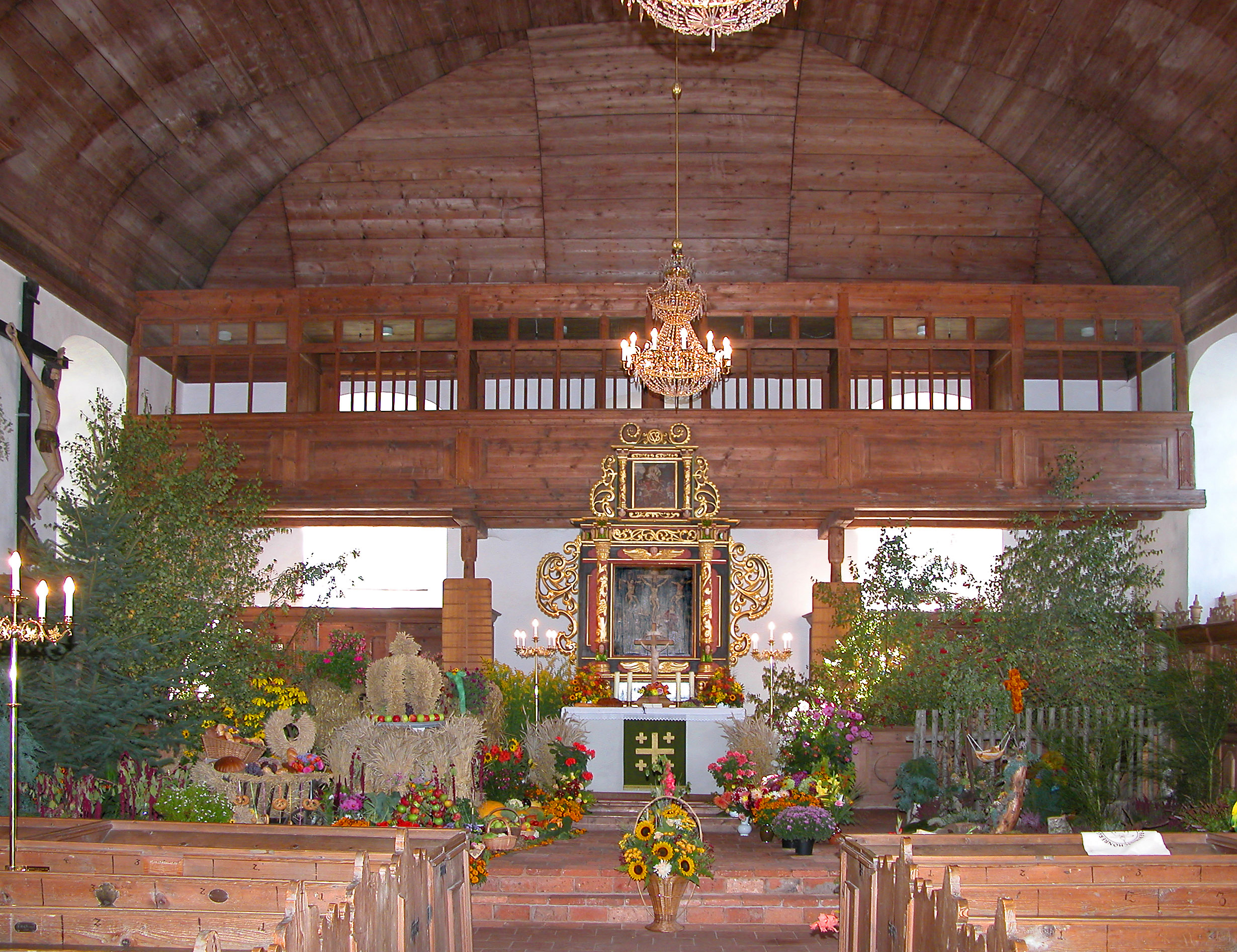 25.09.2006 09526 Oberneuschönberg (Olbernhau): 1659 errichtete Exulantenkirche / Bergkirche Oberneuschönberg (Kirchweg 26; GMP: 50.652064,13.370481). Barocke Dorfkirche mit fast unberührt erhaltener Ausstattung vom Ende des 17. Jahrhunderts. Das Holz für den Kirchenbau sowie den ersten Altar stiftete Caspar von Schönberg. Die drei Altarbilder für den barocken Altar wurden 1673 vom schwedischen Maler Andreas Nordling geschaffen. Sie zeigen den Zyklus Abendmahl - Kreuzigung - Auferstehung. Raumschmuck zum Erntedankfest. [DSCN11763.TIF]20060925100DR.JPG(c)Blobelt